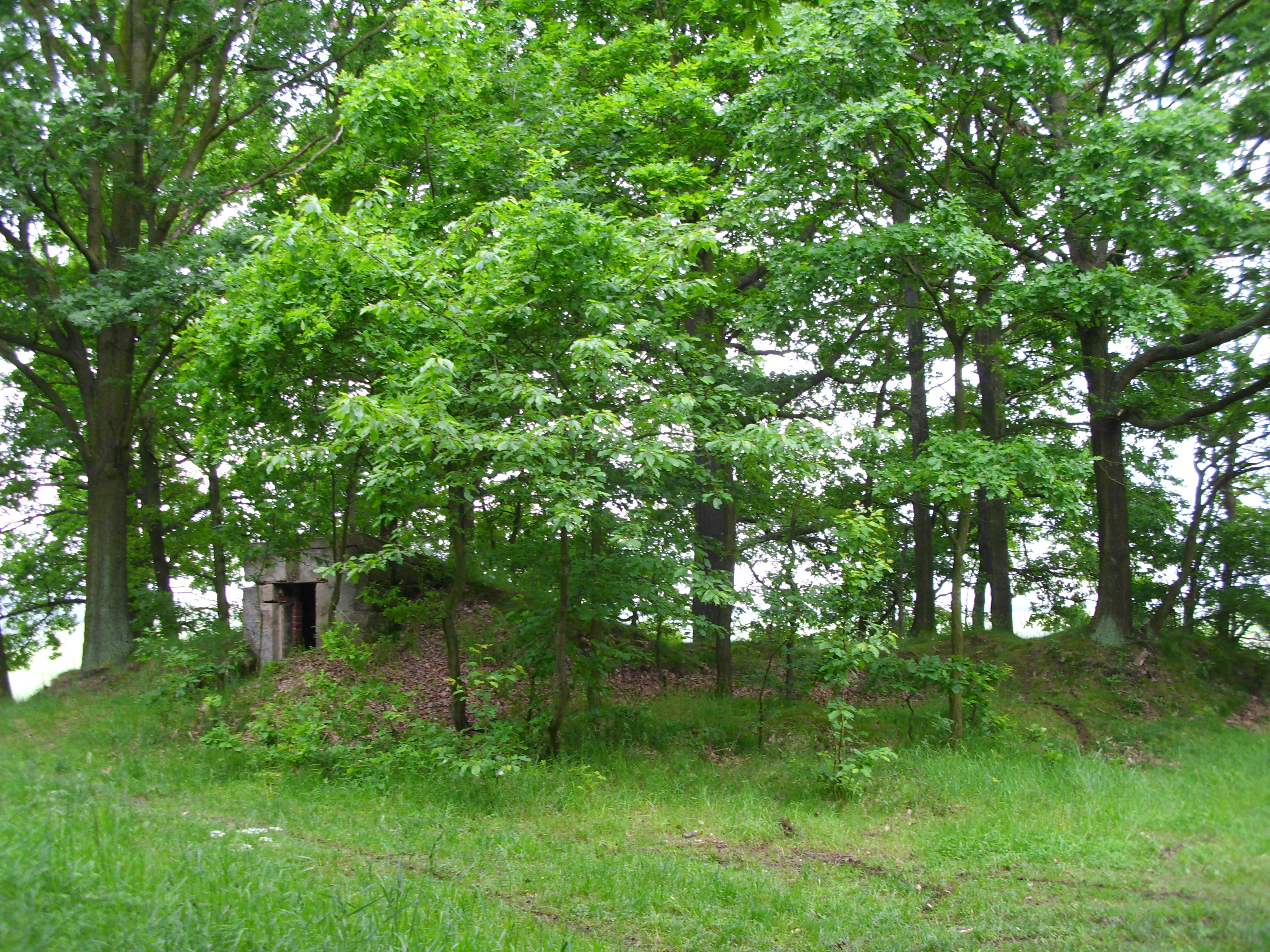 Hier stand einst ein Wachposten in den Kriegsjahren, es könnte aber auch als Sprenghaus des ehemaligen Steinbruch gedient haben.